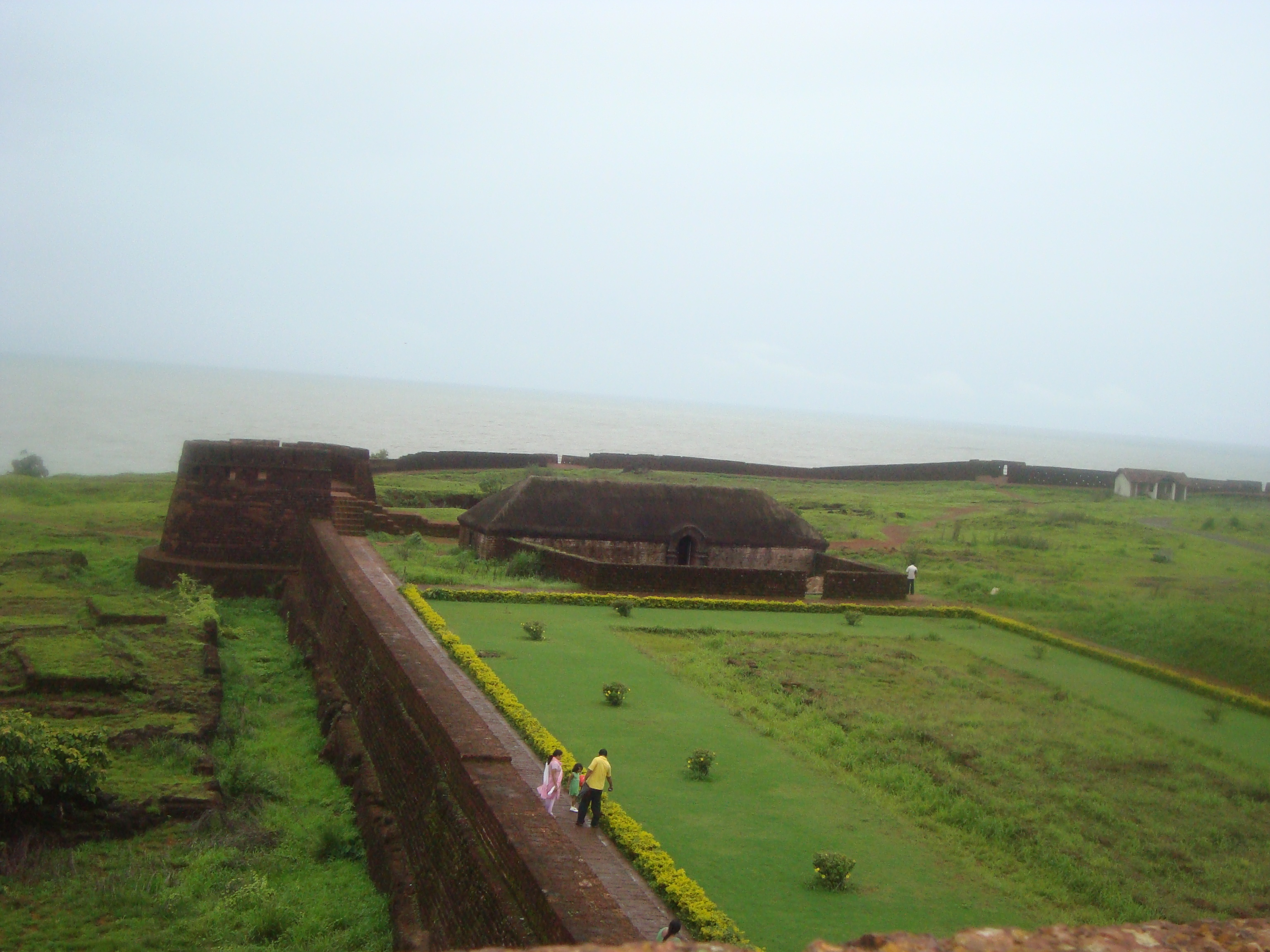 ബേക്കൽ കോട്ട - മദ്ധ്യഭാഗത്തെ പുര